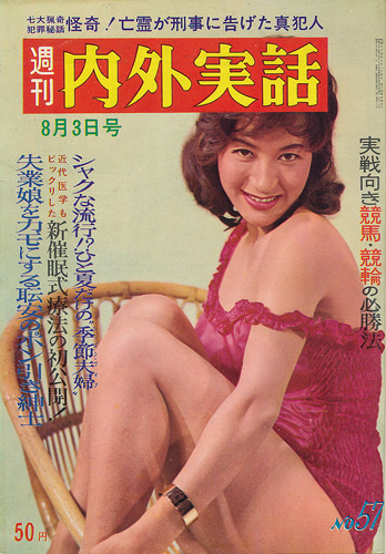 『週刊内外実話』昭和37年8月3日号表紙（1962年8月3日発行）